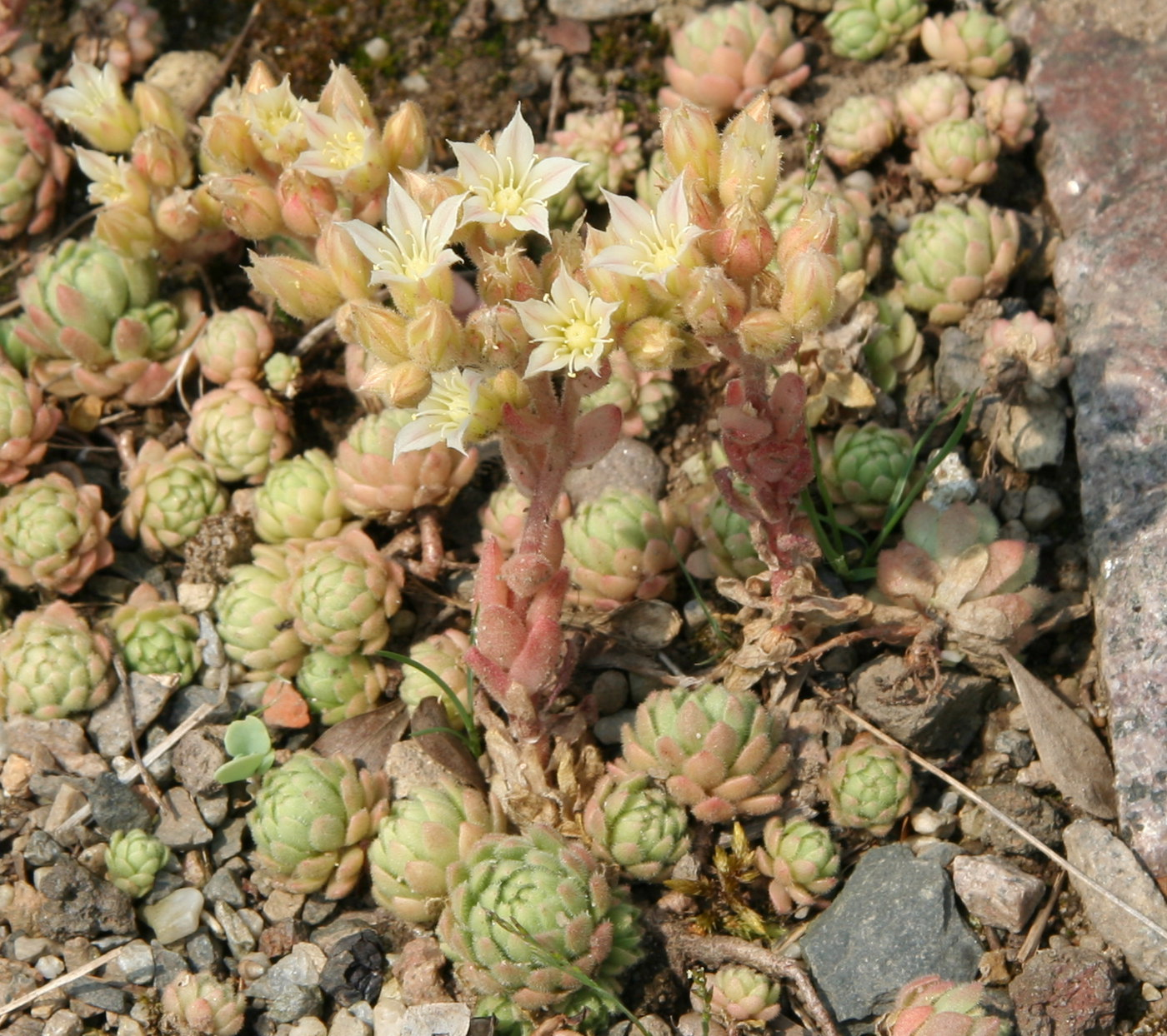 Prometheum chrysanthum im Botanischen Garten Dresden